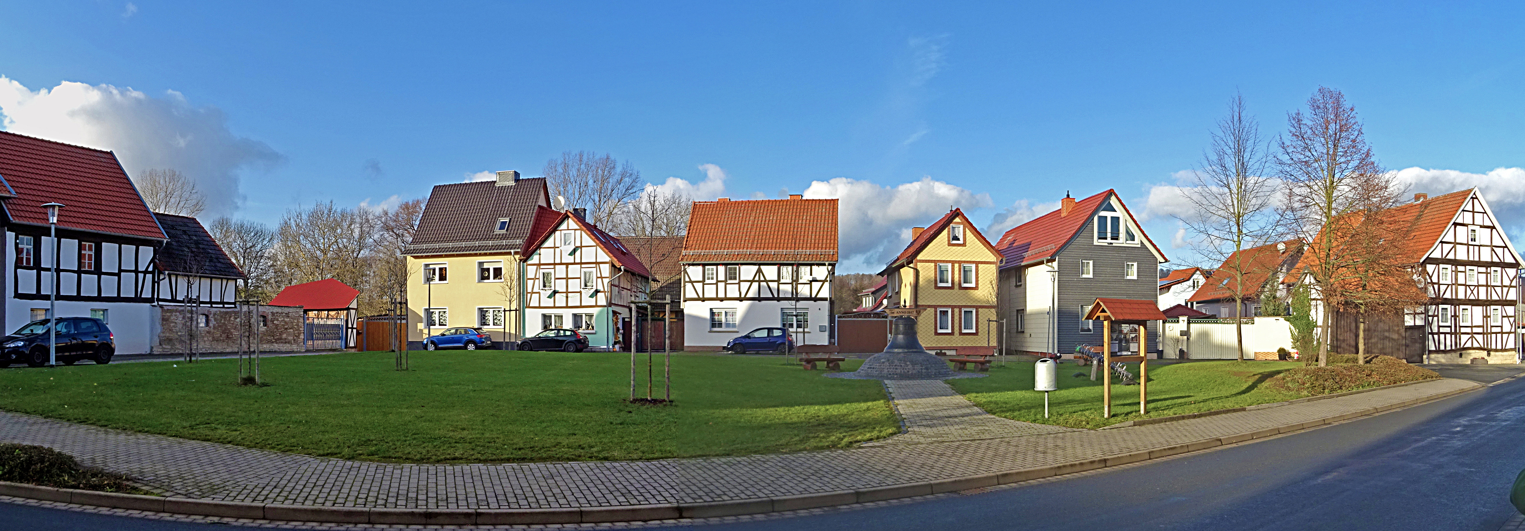 Bernterode (Breitenworbis), Ortsmitte